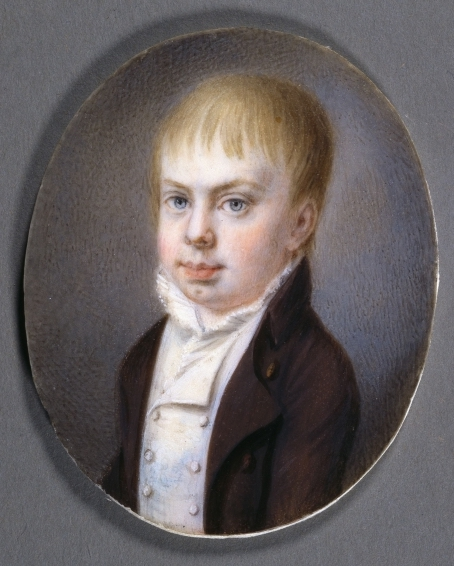 Leopold von Toskana.